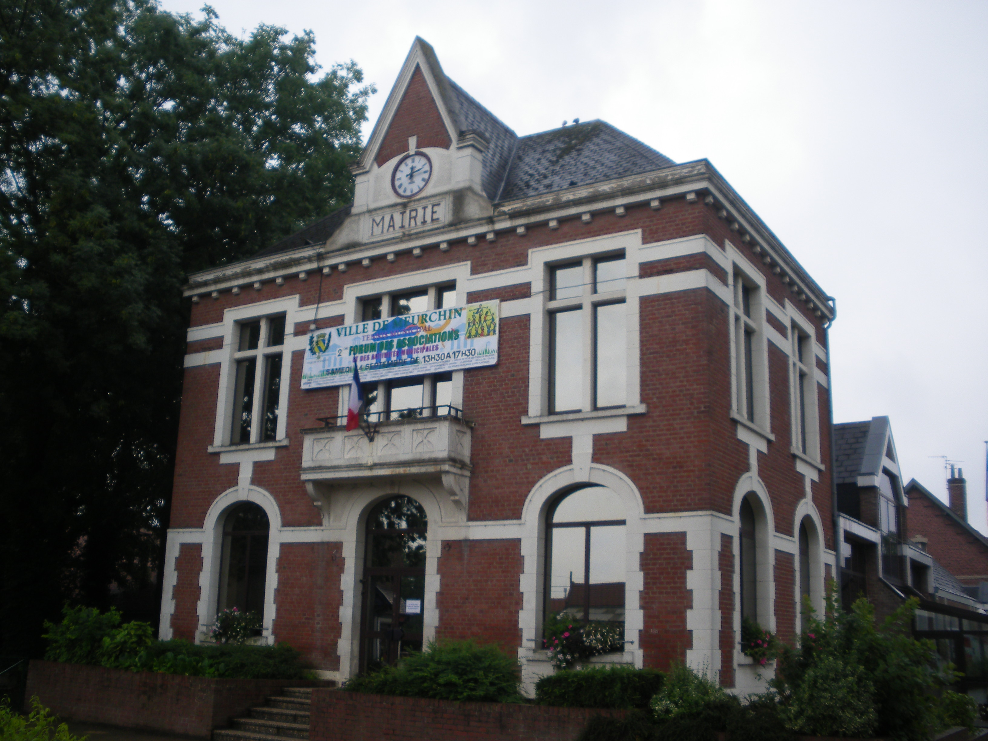 Vue de la mairie de Meurchin.